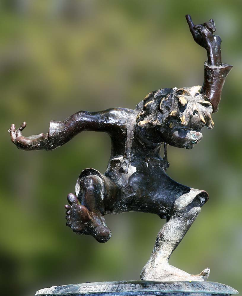 Pumucklbrunnen im Luitpoldpark in München